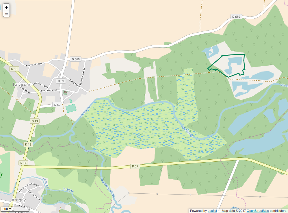 Périmètre de la RNR des étang et prairies humides des Paquis.